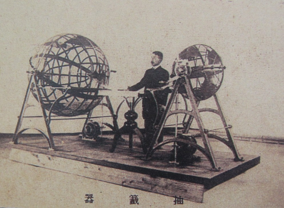 1906年臺灣彩票用的抽籤機